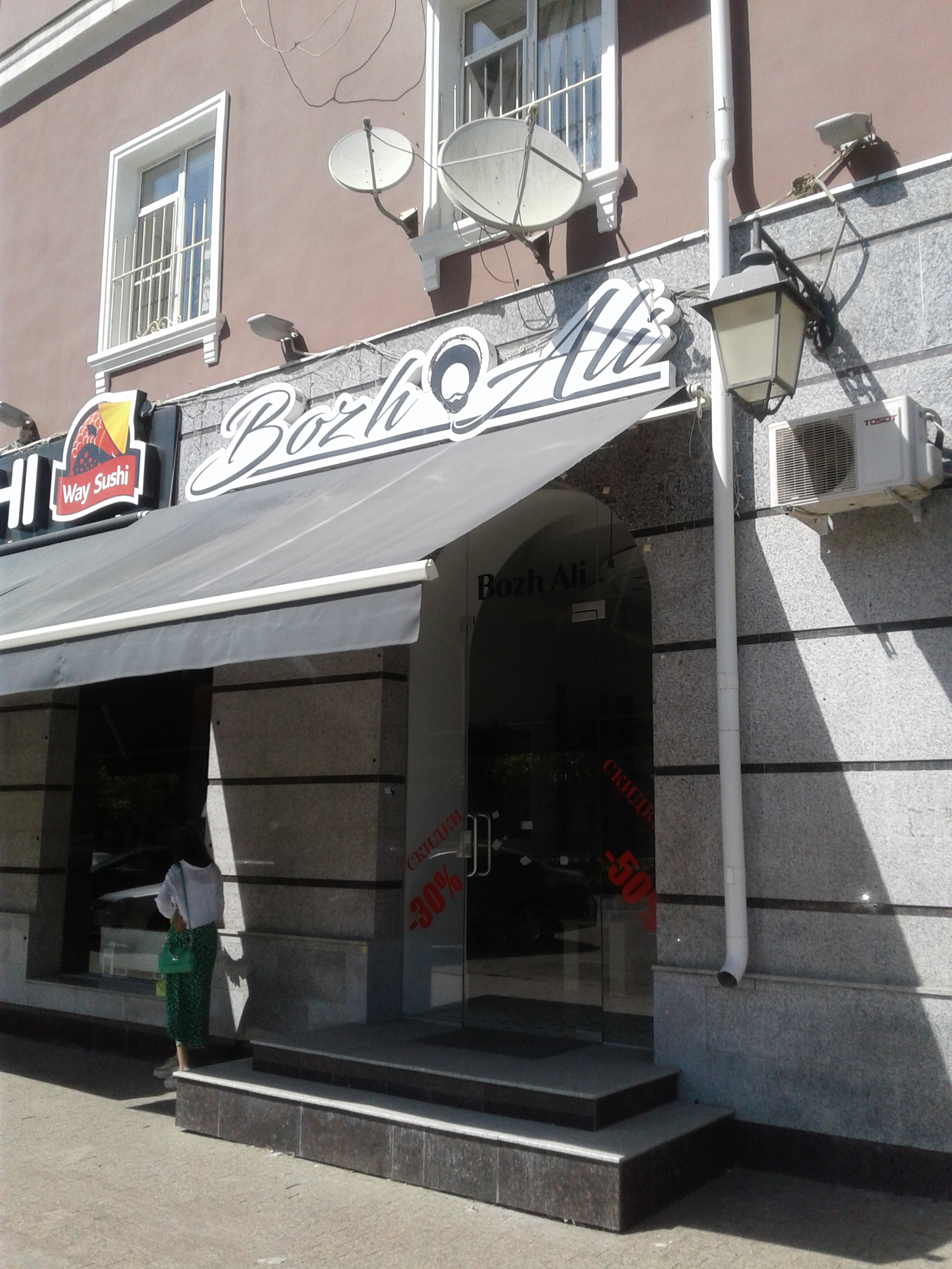 Грозный. Кафе "Бож-Али"